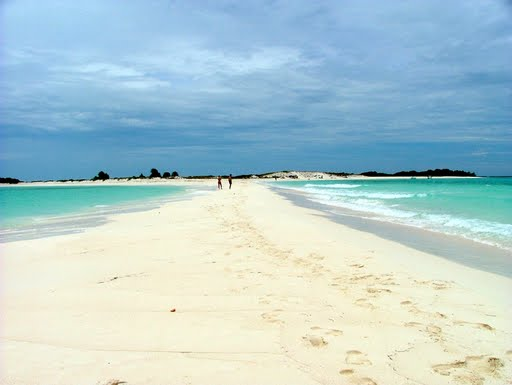 Cayo Herradura, isla La Tortuga, Venezuela.